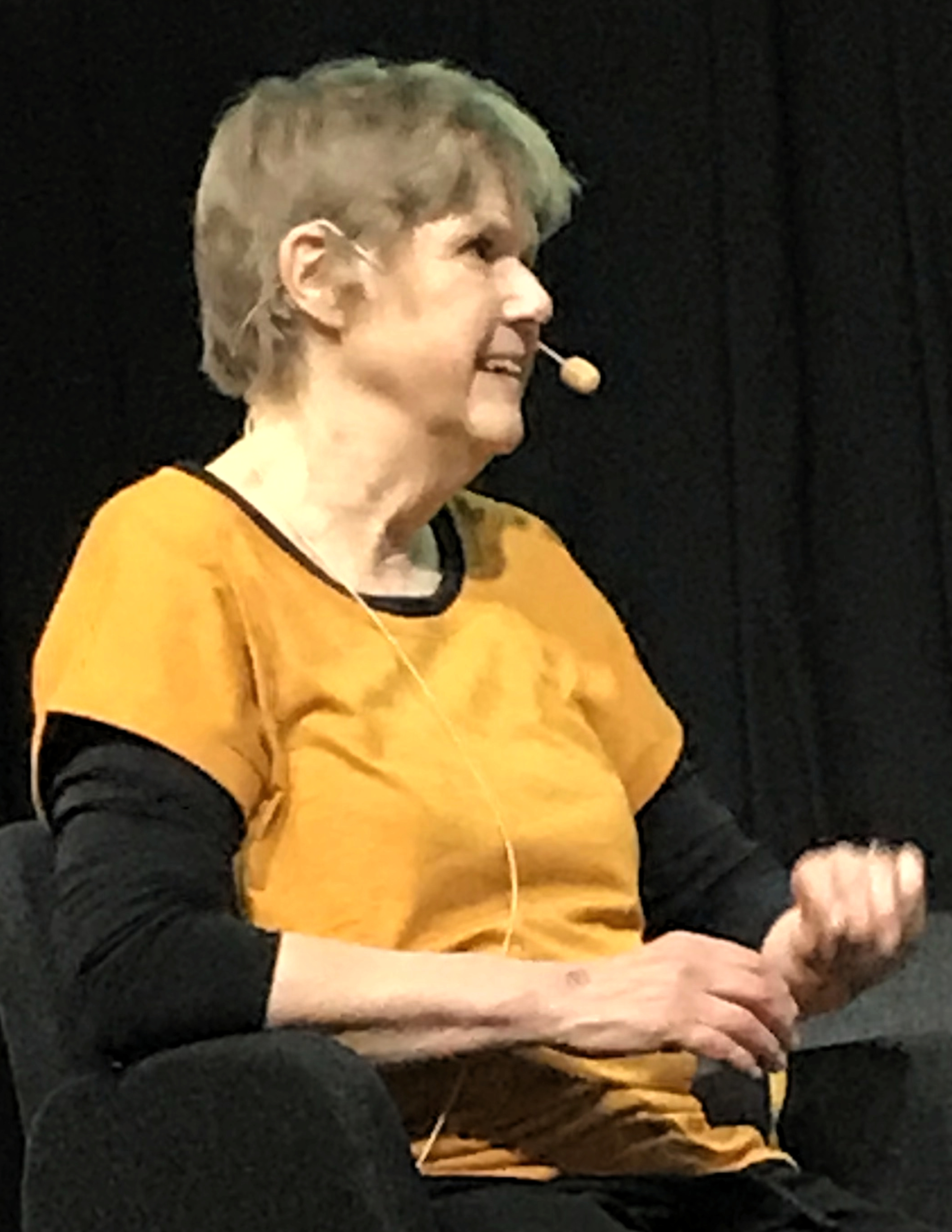 Ann Beskow, på Bokmässan i Göteborg 2019.